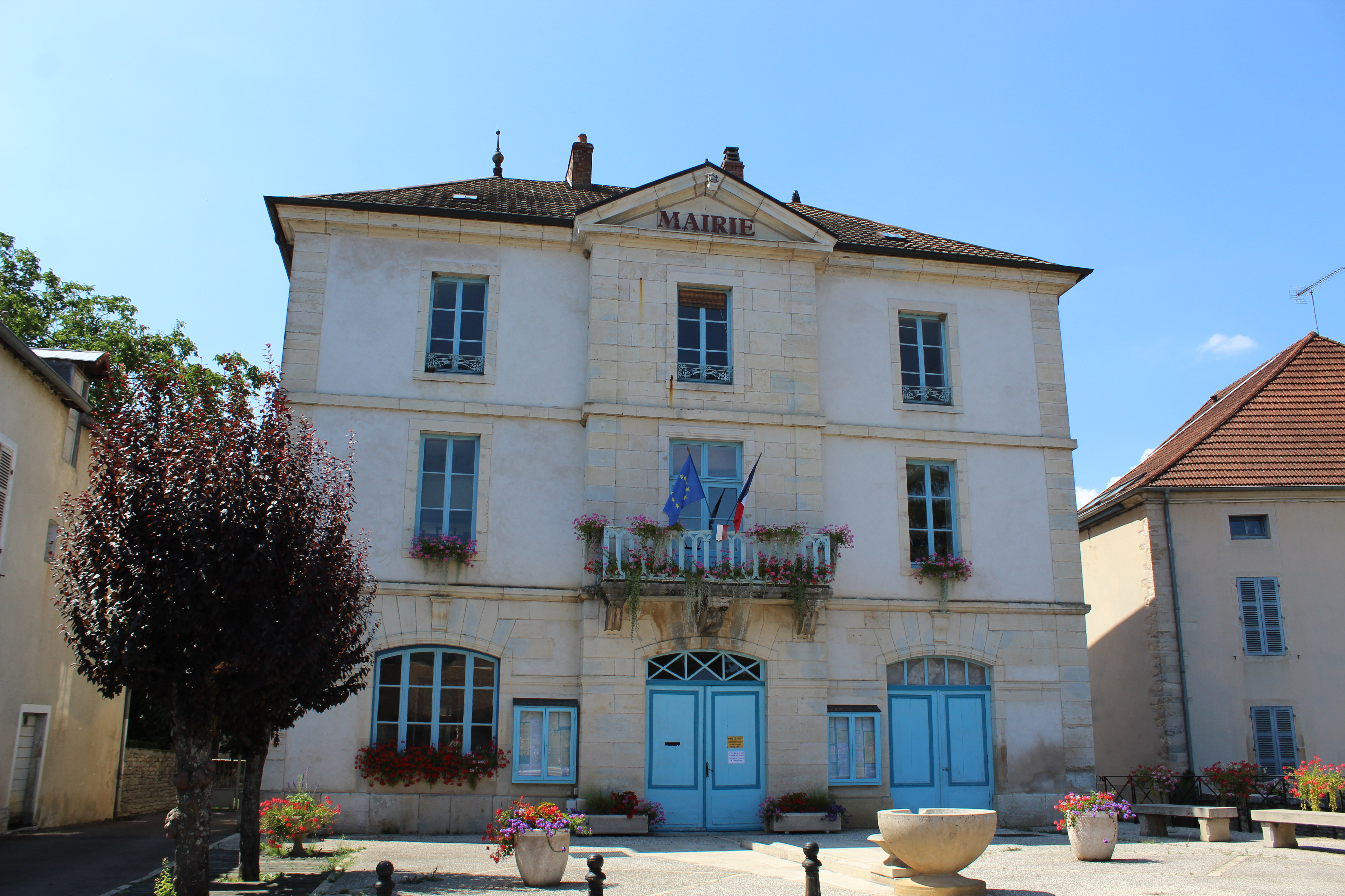 La mairie